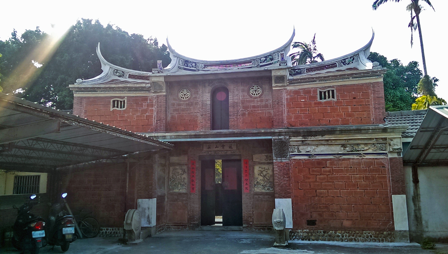 筱雲山莊迎賓館